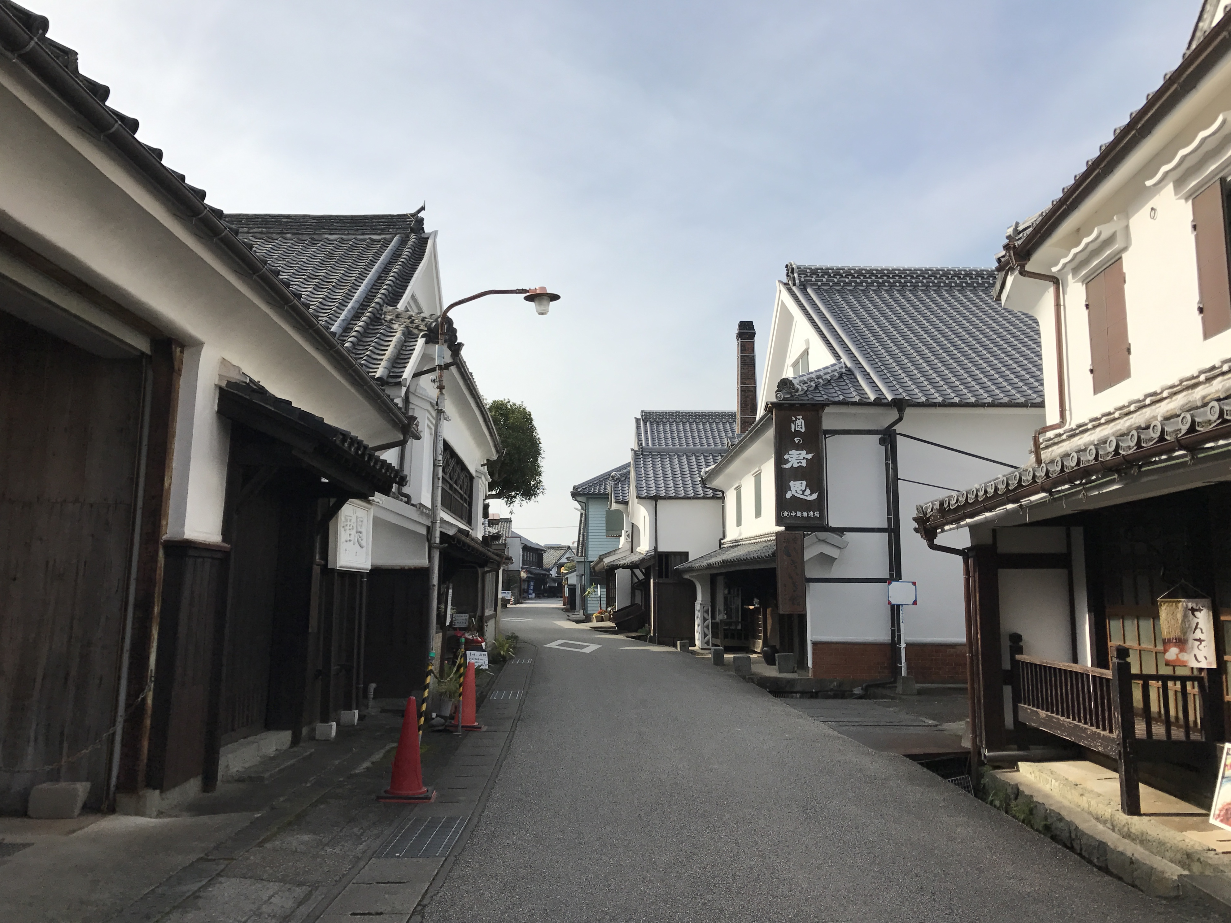 浜中町八本木宿・酒蔵通り